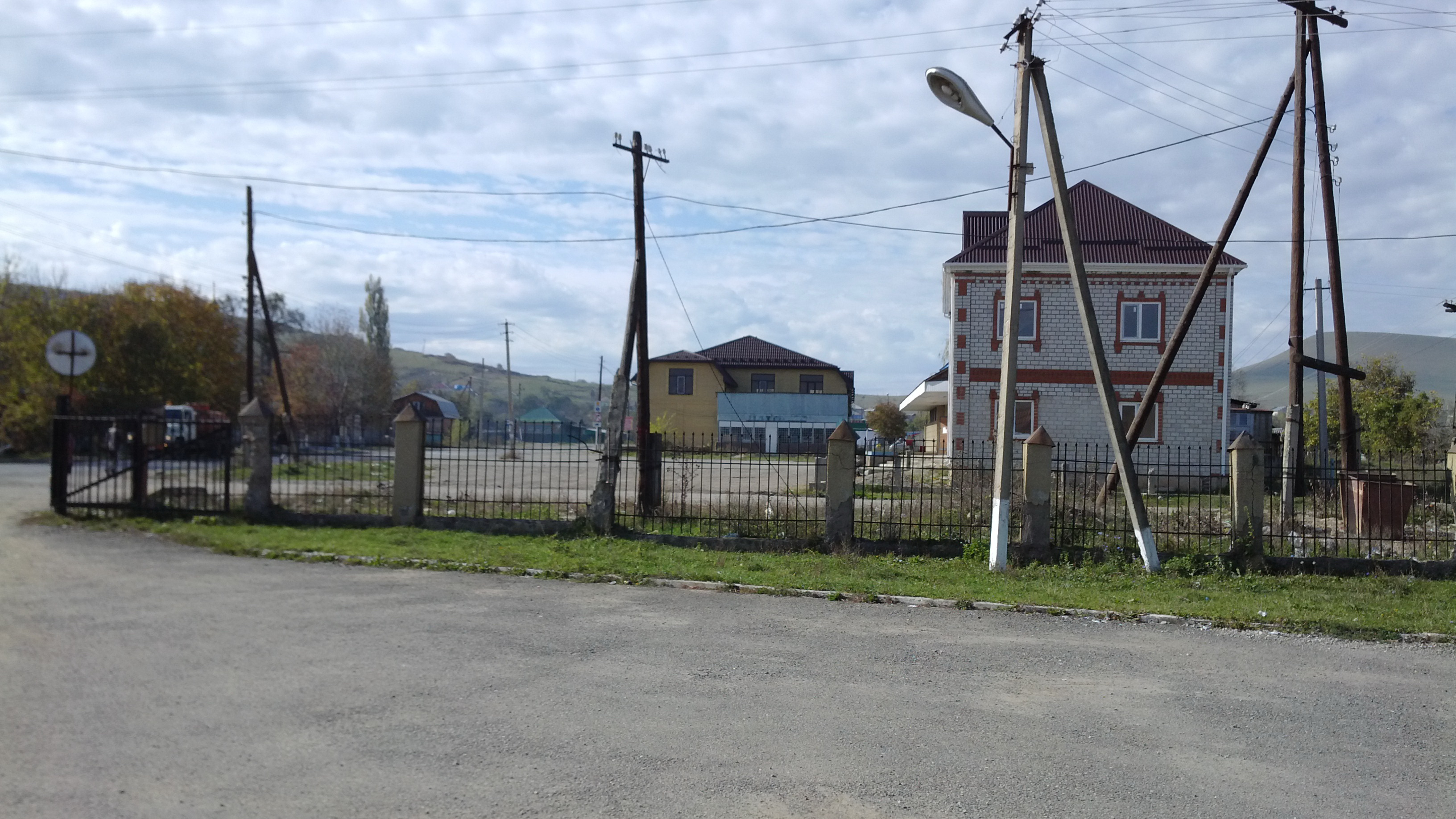 Pregradnaya, Karachaevo-Cherkesskaya Republits, Russia